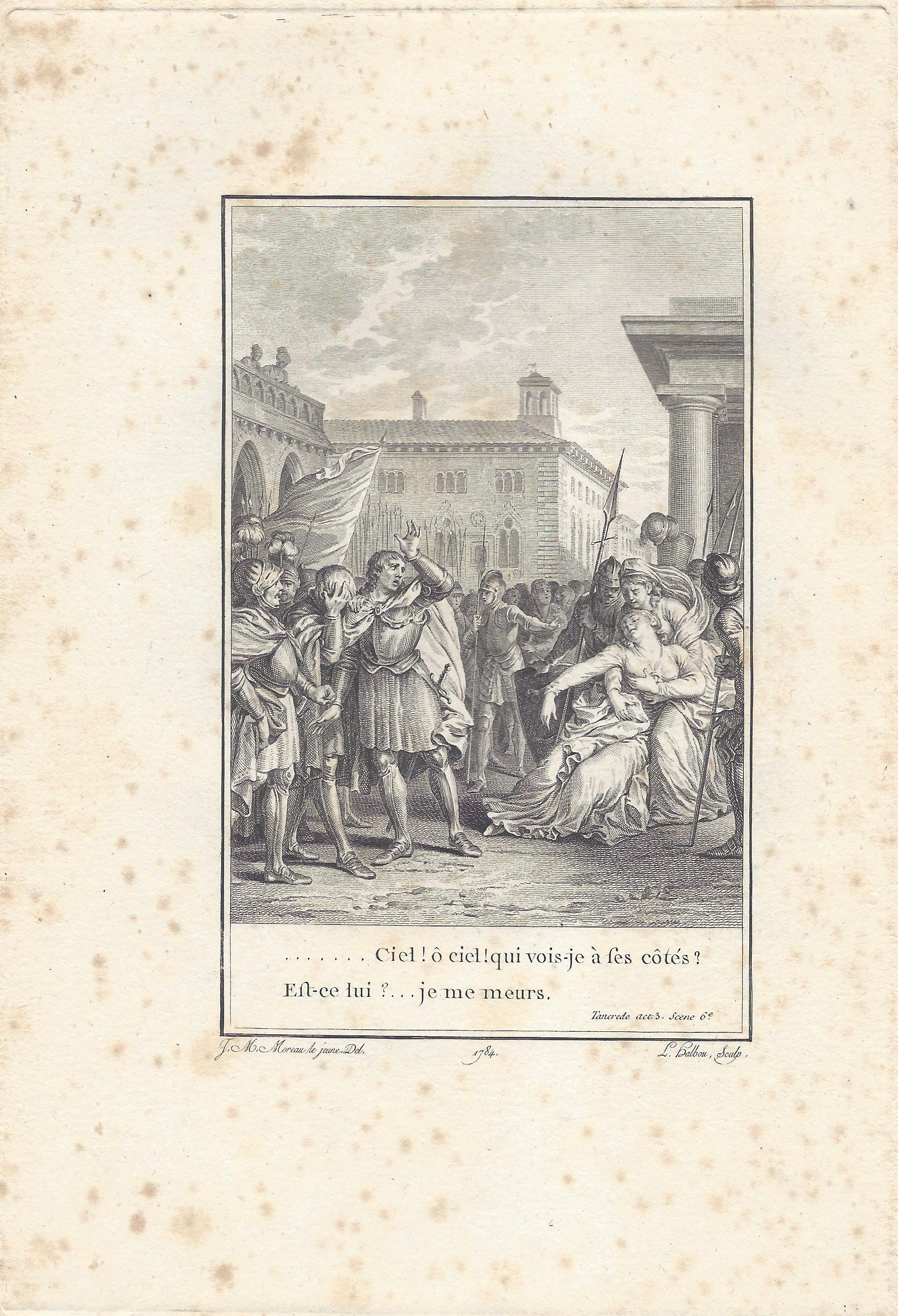 Voltaire: Tancrede Akt 3 Szene 6 Kupferstich von Louis-Michel Halbou nach Jean-Michel Moreau